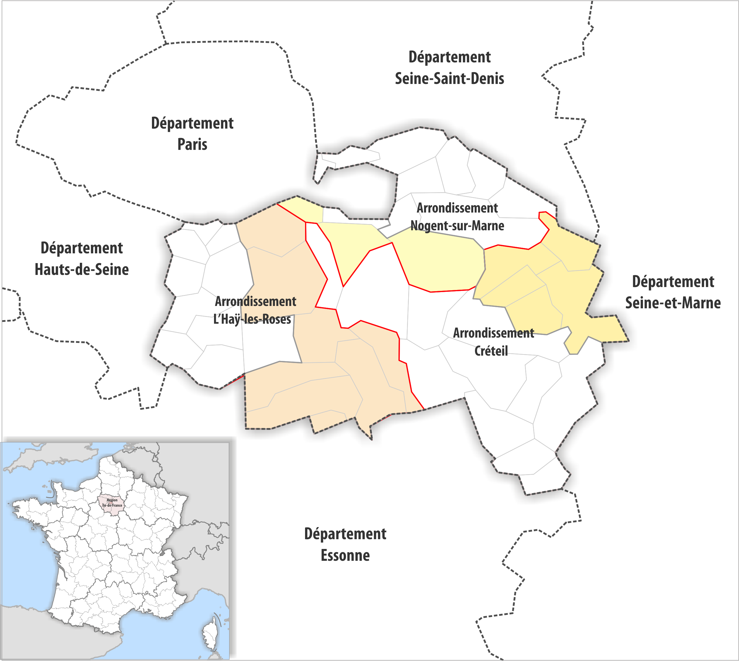 Arrondissements Anpassungen auf 2017 im Departement Val-de-Marne